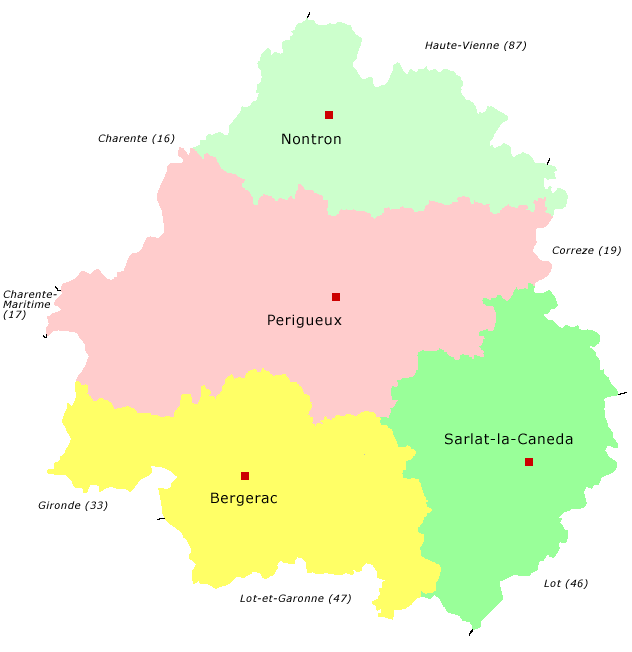 Départment Dordogne mit Verwaltungsgliederung